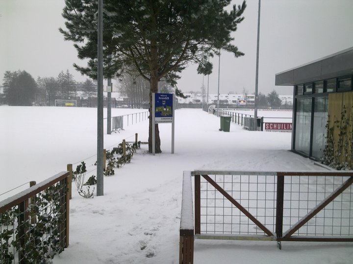 Foto van de entree van Sportpark Faas Wilkes van XerxesDZB